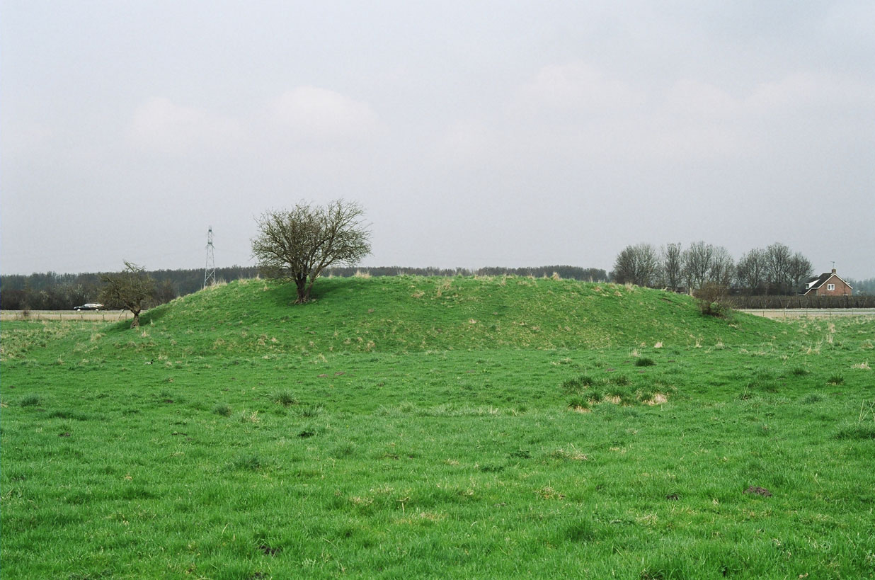 Vliedberg Baarsdorp-Noord